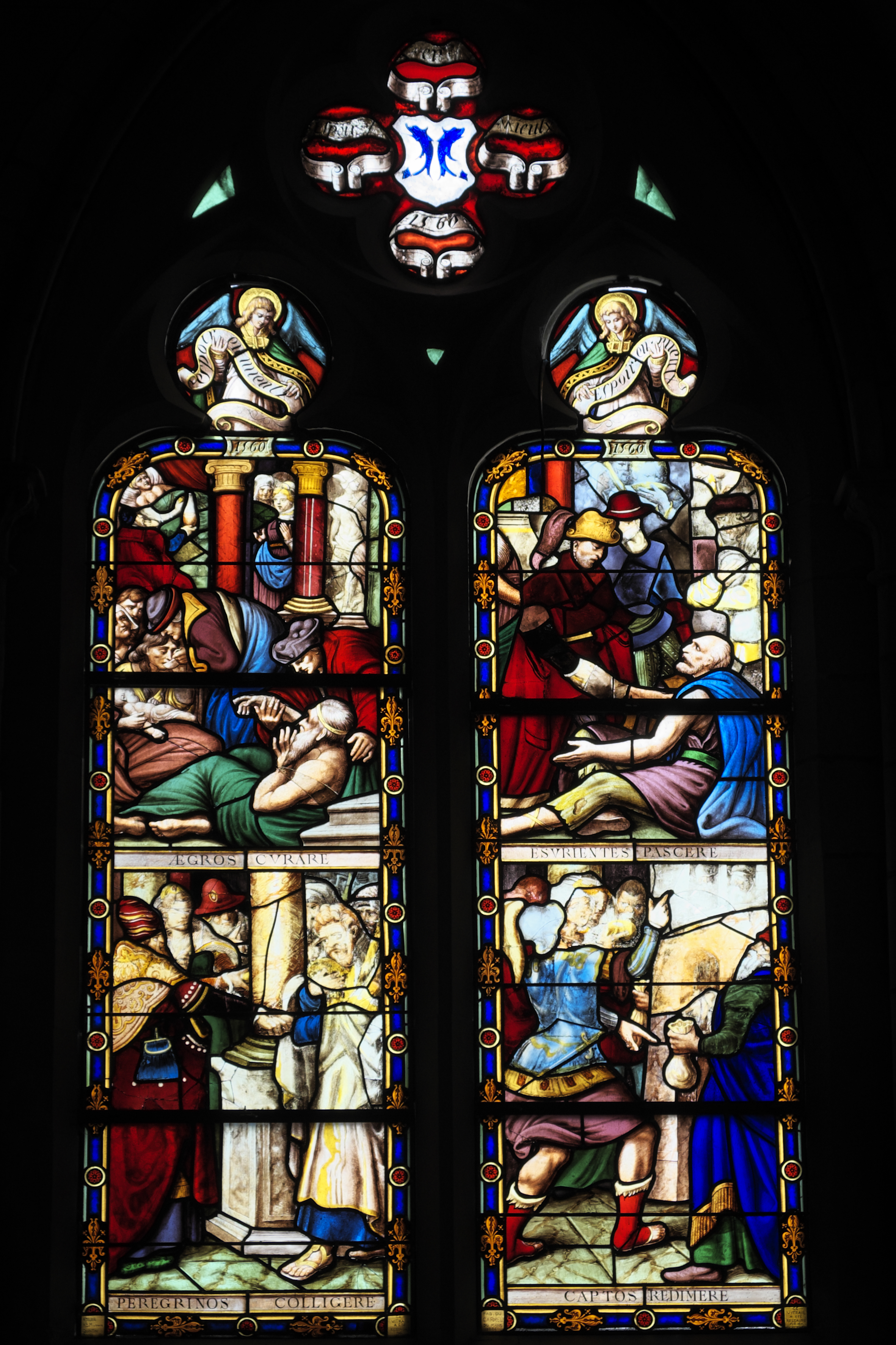 Ehemalige Kathedrale Saint-Paul-Aurélien in Saint-Pol-de-Léon im Département Finistère (Region Bretagne/Frankreich), Bleiglasfenster